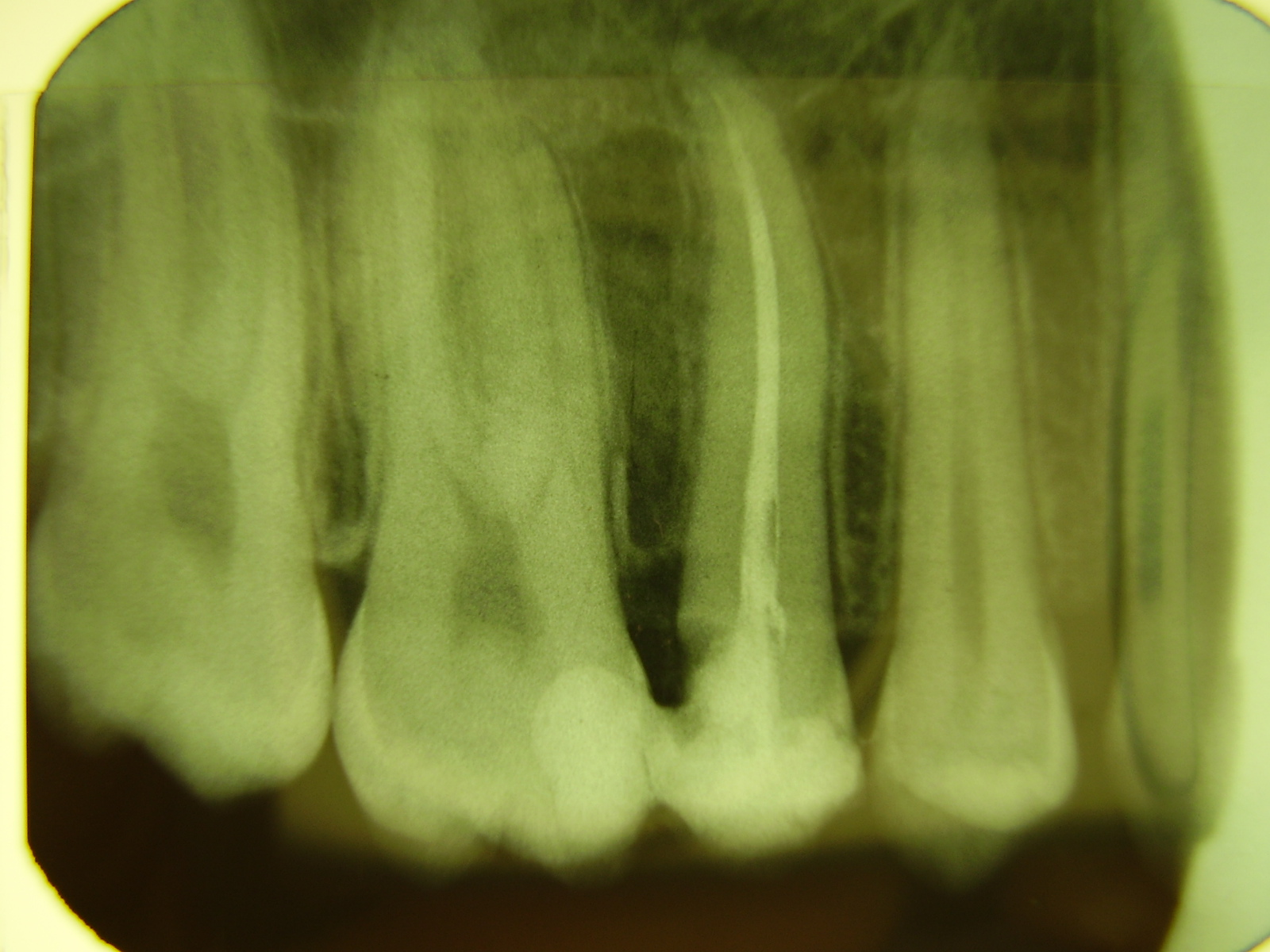 Dental X-ray